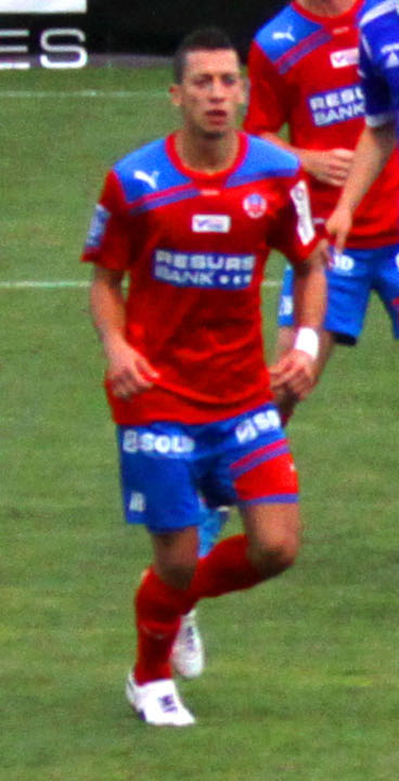 Nikola Djurdjic